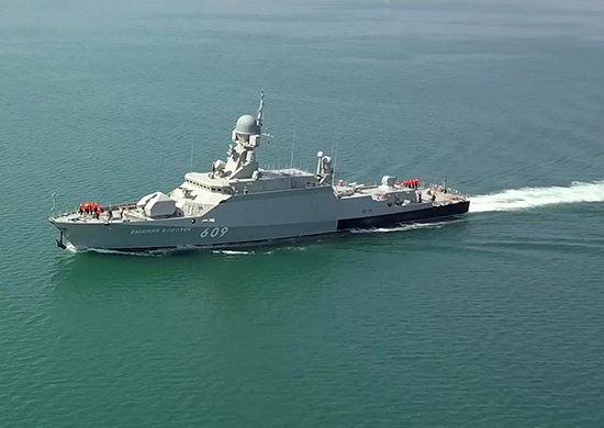 Малый ракетный корабль "Вышний Волочёк" проекта 21631 Краснознаменного Черноморского флота